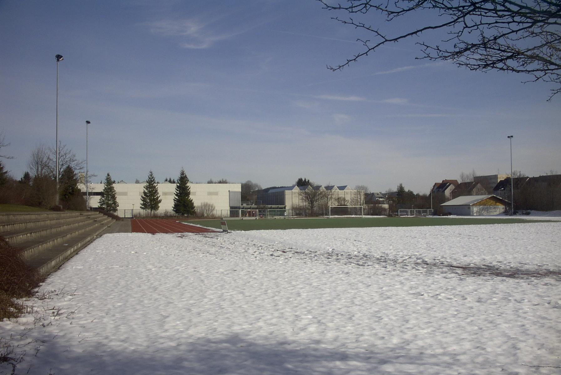 Gymnasium am Deutenberg - Sportanlagen, Villingen-Schwenningen, Deutschland